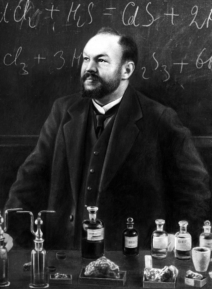 Lev Chugaev